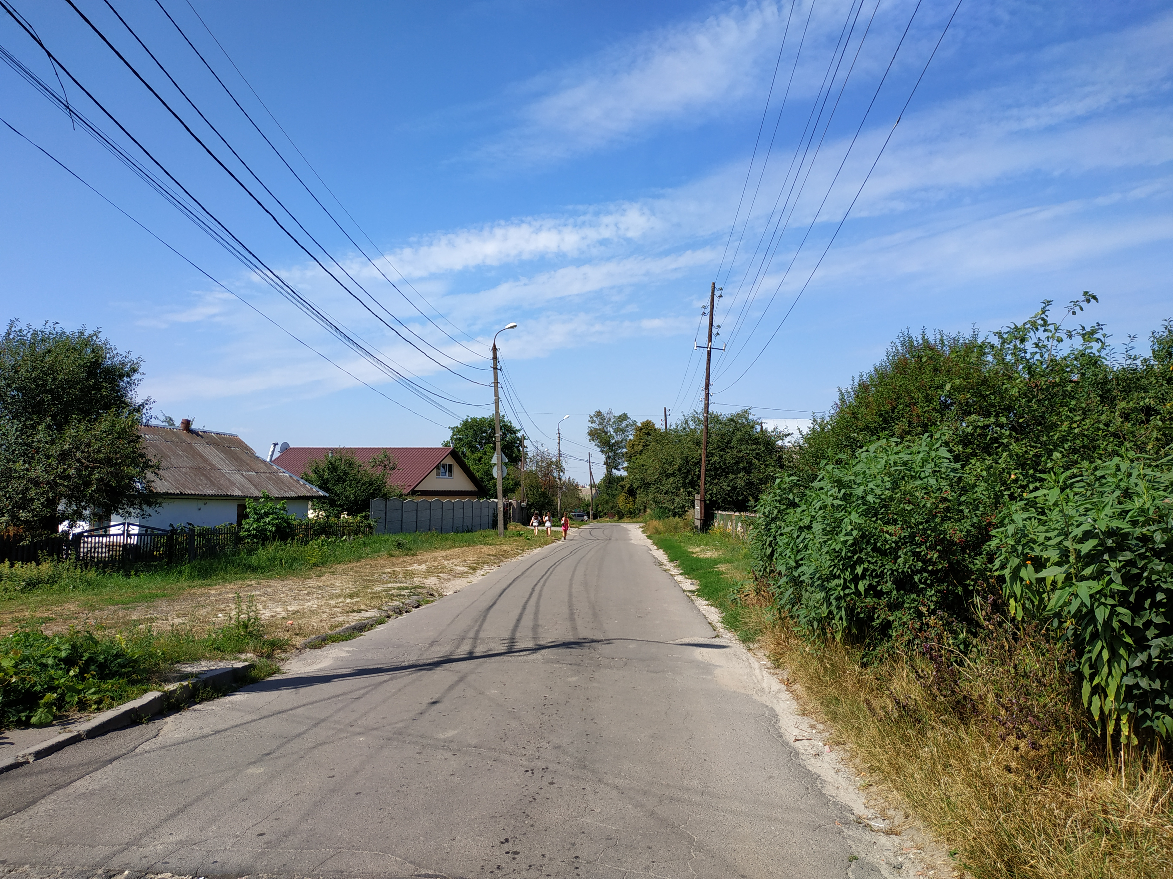 Мікрорайон Лезневе, вулиця Профспілкова